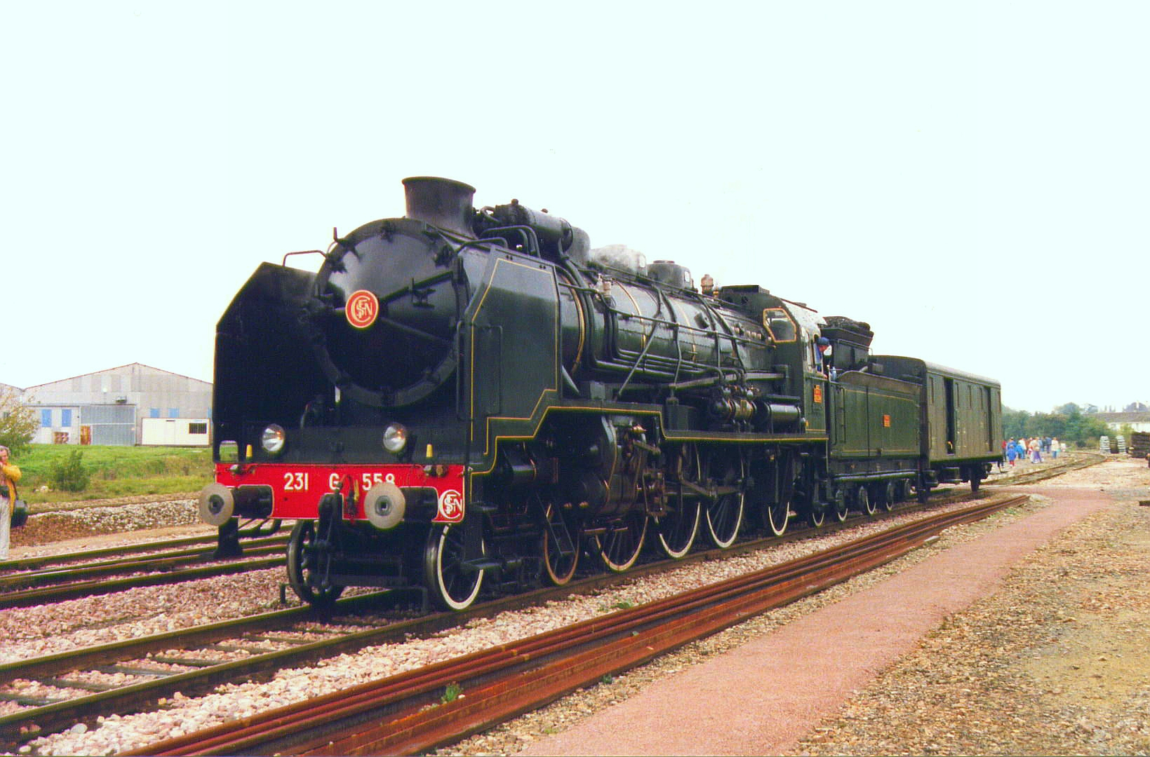 Pacific 231G 558 photo prise à Bayeux (Calvados-France)